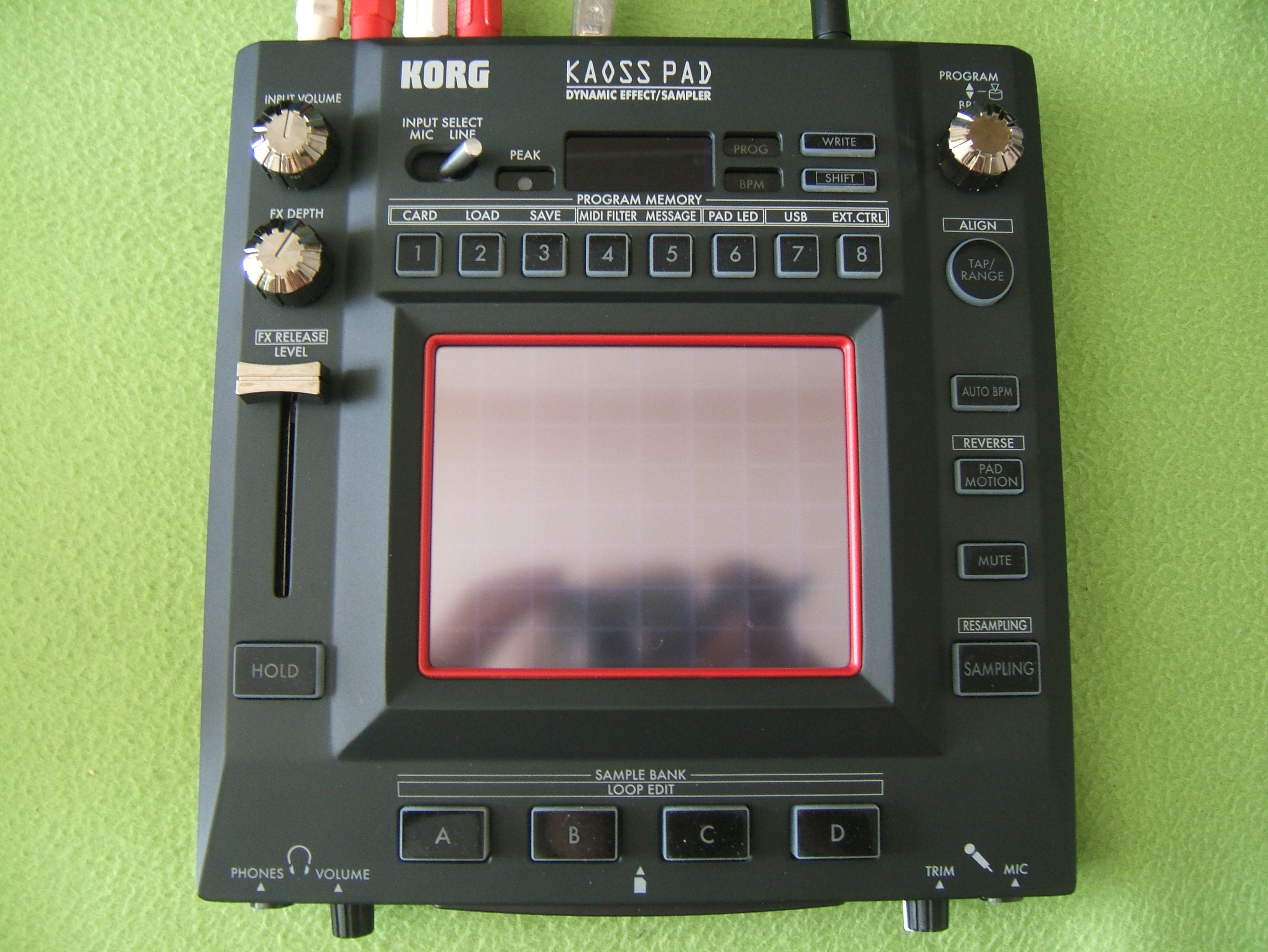 KAOSS Pad 3 von Korg